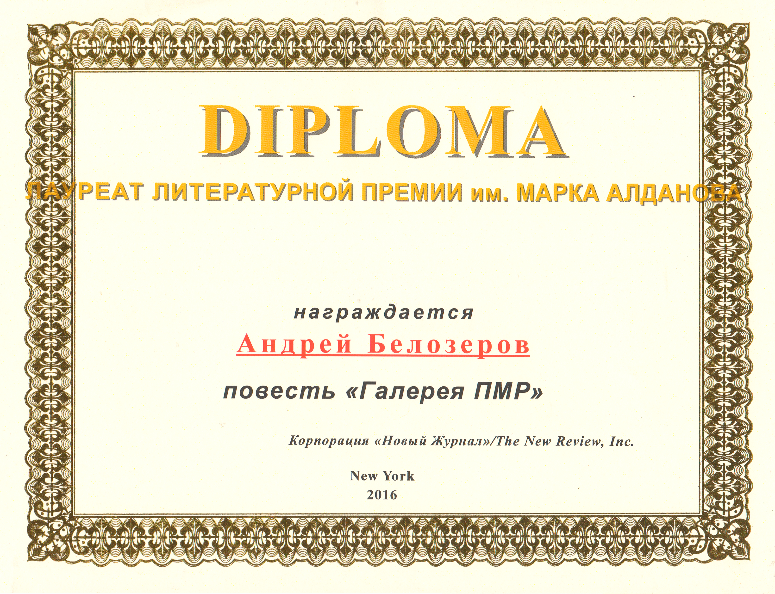 Диплом Андрея Белозёрова Лауреата премии имени Марка Алданова-2016